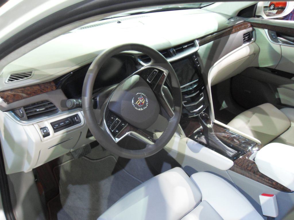 SDC11657